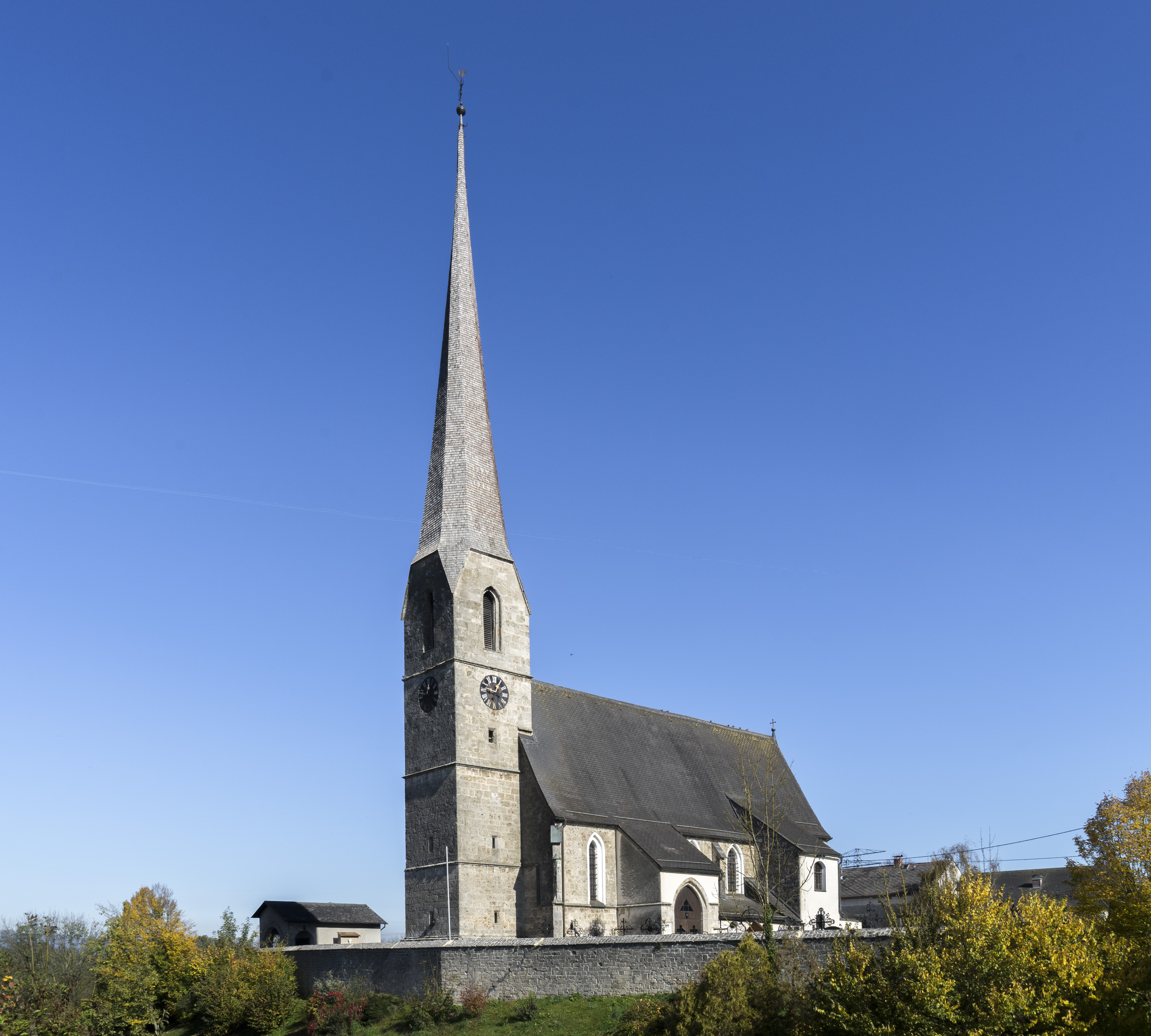 Kath. Pfarrkirche und Friedhof